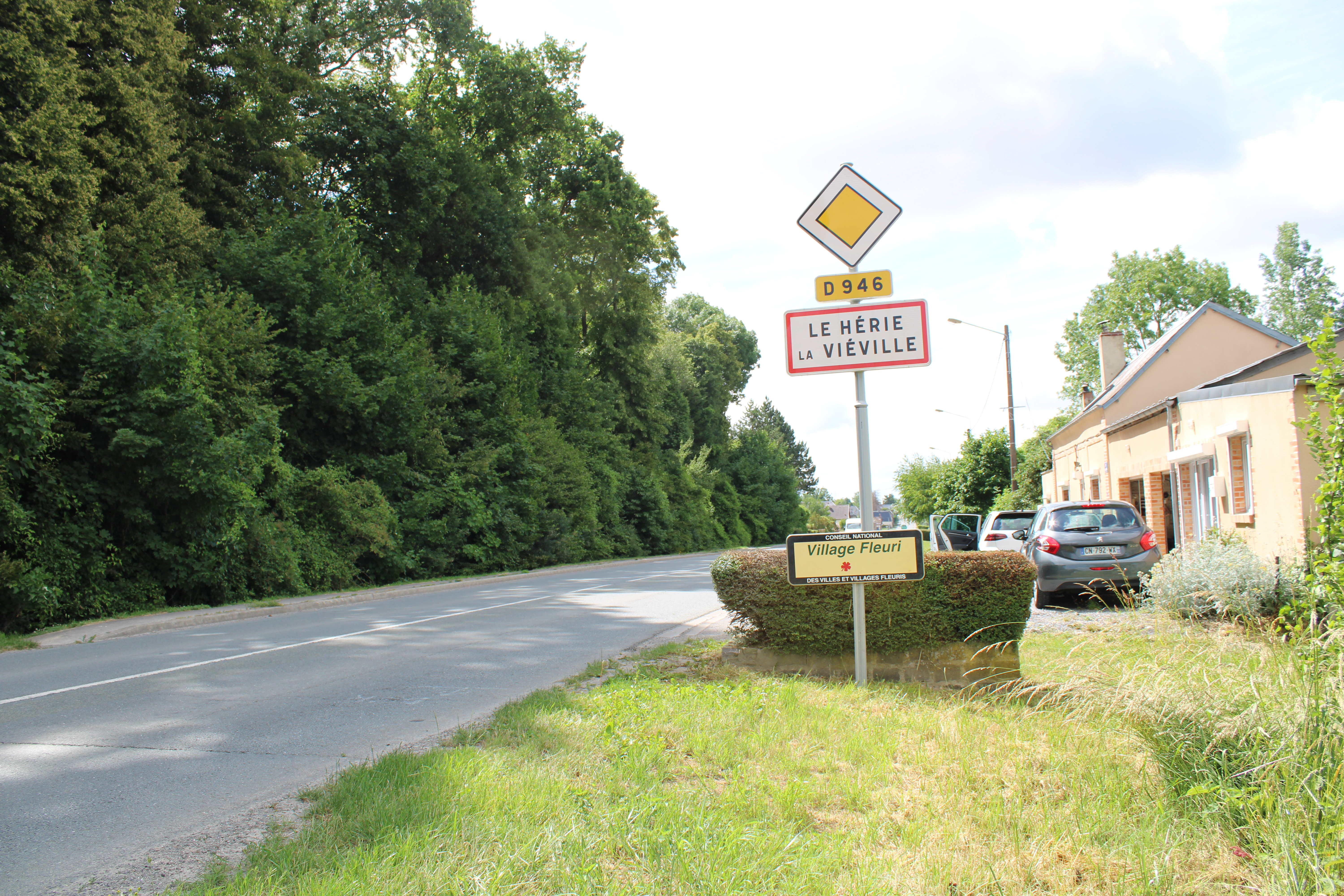 Entré du village